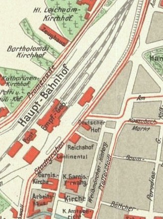 Gdańsk Śródmieście, ul. Podwale Grodzkie i okolice. Czerwonymi kreskami zaznaczone linie tramwajowe.